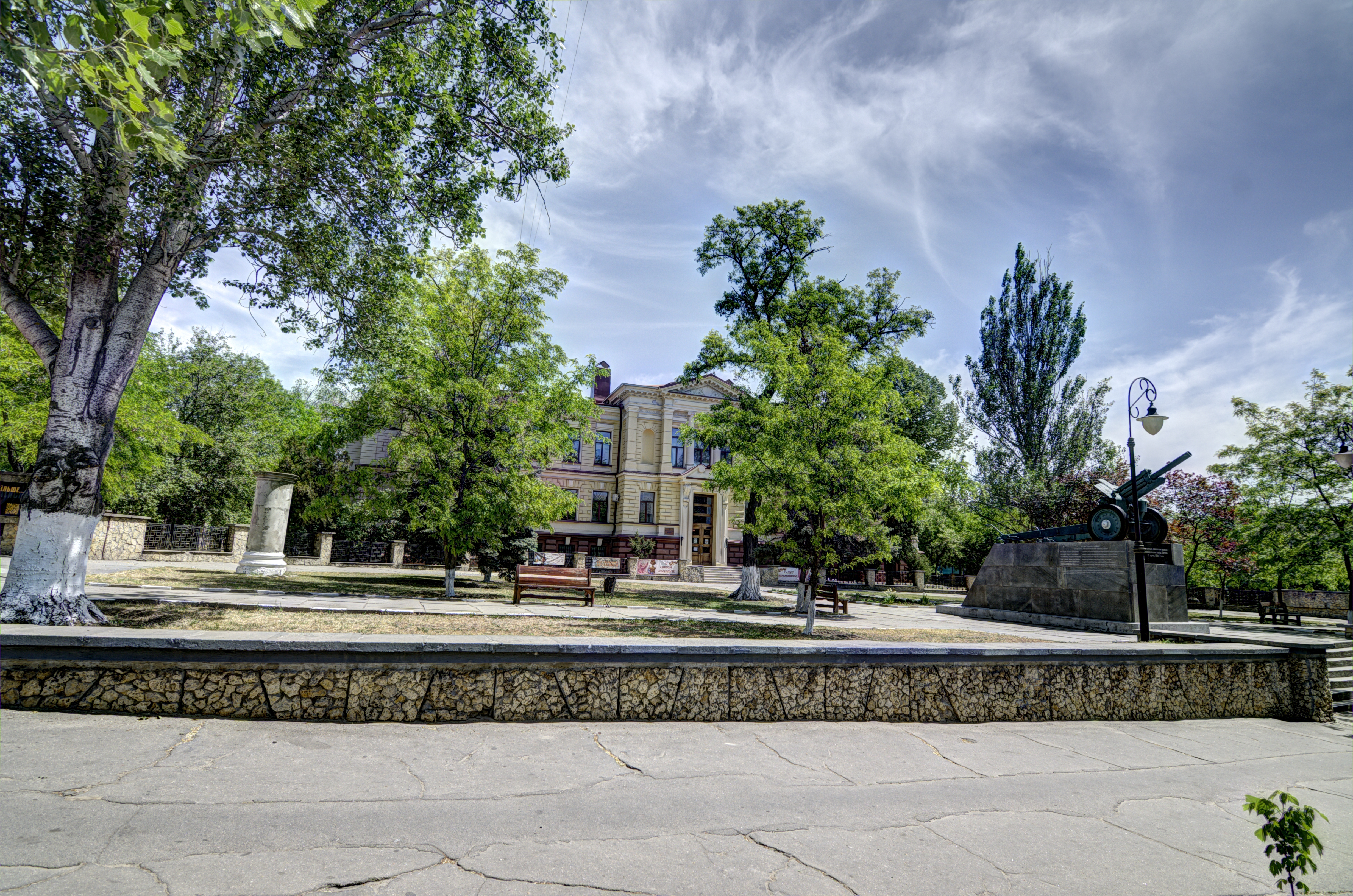 Будівля окружного суду, Херсон, Леніна вул., 9